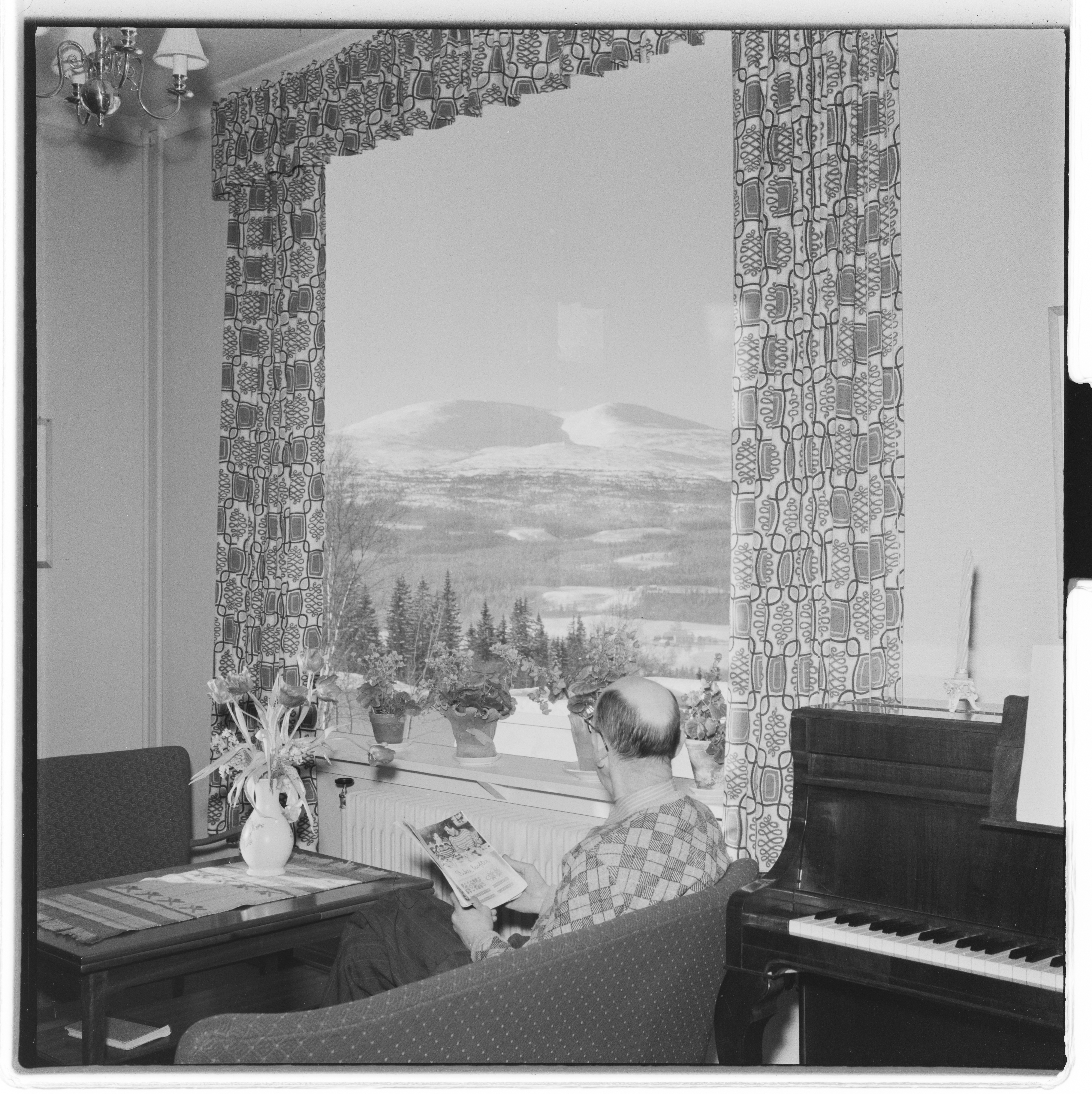 Bildet er hentet fra Arkivverket. Sanitetshjemmet Solfeng i Meråker. Innviet i 1924. Gikk fra å være tuberkulosehjem til å bli rekreasjonshjem i 1953. Arkivinstitusjon : Riksarkivet Arkivnavn : Billedbladet NÅ Sted : Norge, Nord-Trøndelag, Meråker, Meråker Emneord: Meråker sanitetsforening, Tuberkulosehjem, Rekreasjonshjem, Sanitetshjem, Sanitetsforeninger Avbildet